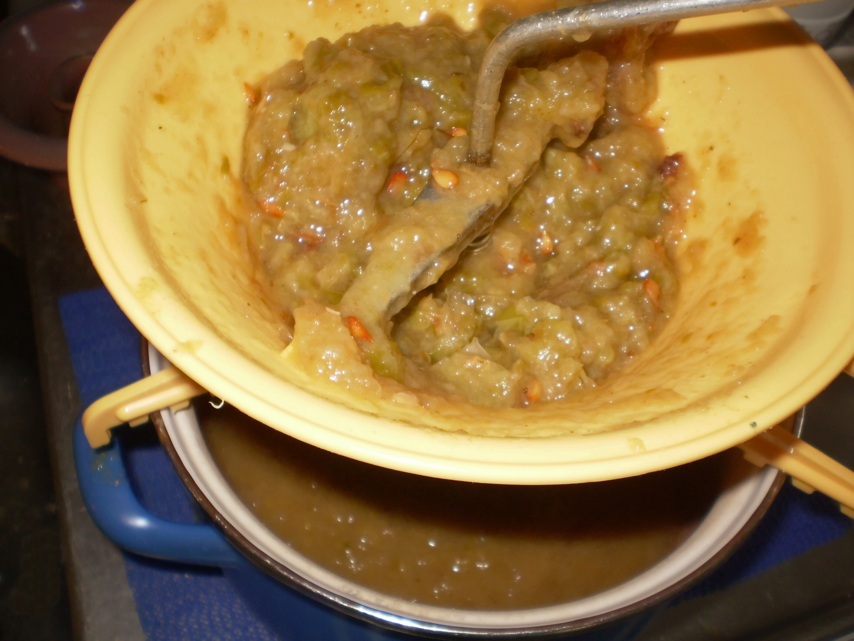 Passieren von gegarten Äpfeln mithilfe einer Passiermühle bei der Zubereitung von Apfelmus.